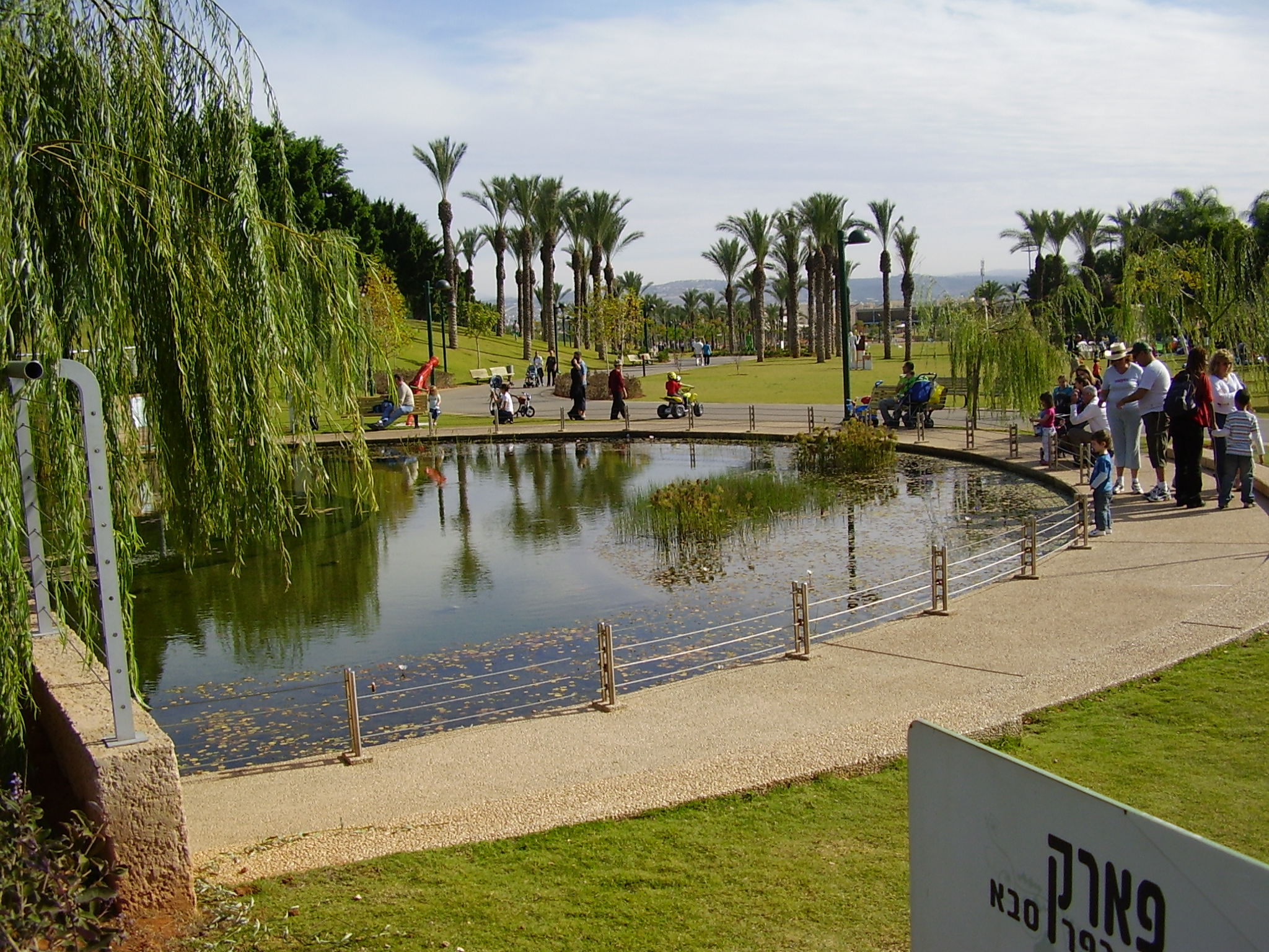 Kfar Saba Park, Israel